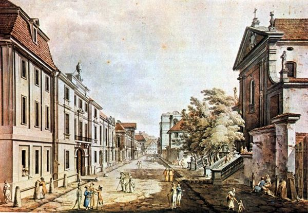 Die Ulica Miodowa in Warschau mit der Kapuzinerkirche